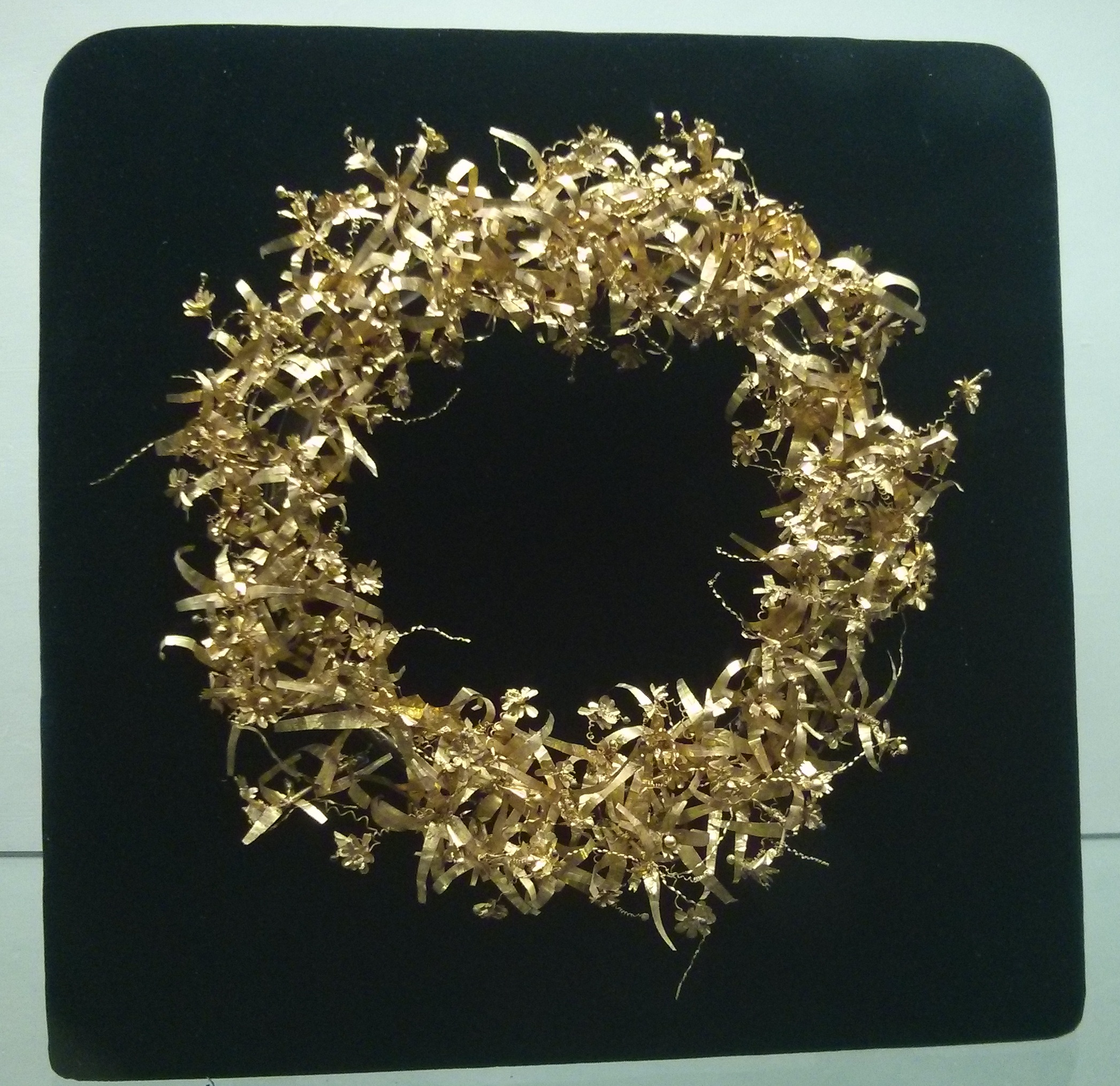 Museo Archeologico Nazionale delle Marche - MIBAC This is a photo of a monument which is part of cultural heritage of Italy.